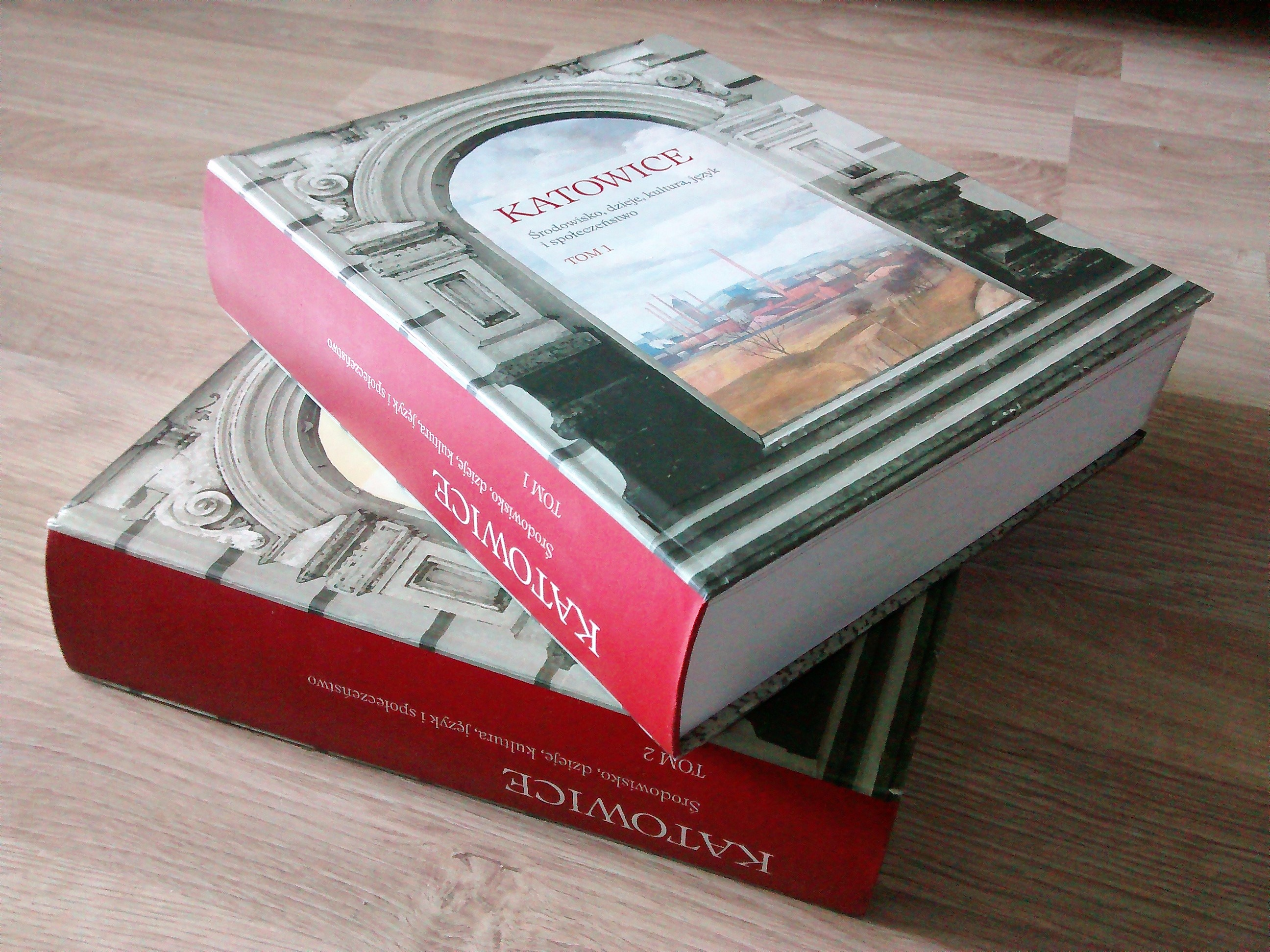 "Katowice. Środowisko, dzieje, kultura i społeczeństwo", red. Antoni Barciak, Ewa Chojecka, Sylwester Fertacz, Katowice 2012. Dwutomowa publikacja wydana przez Muzeum Historii Katowic.